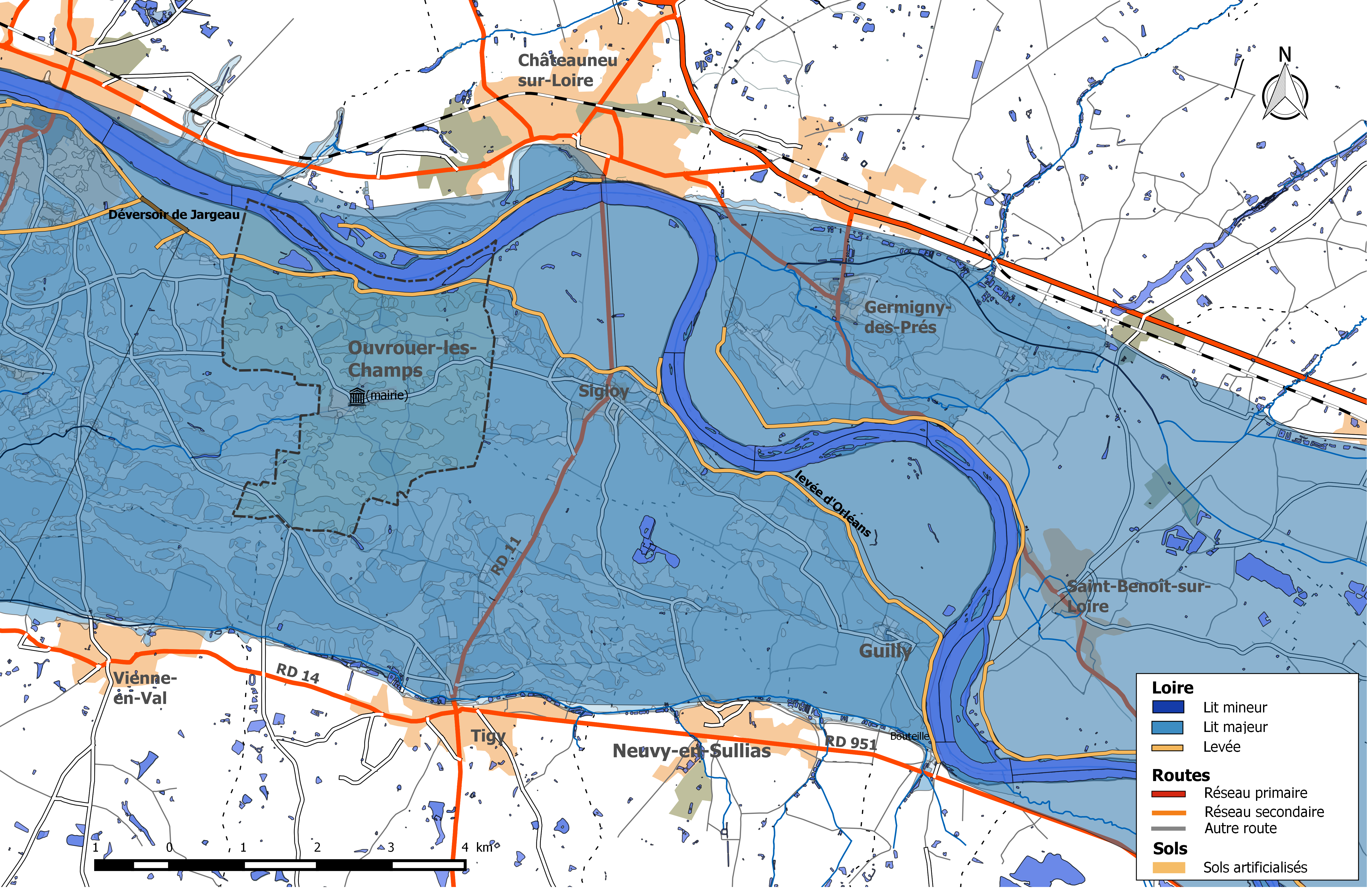 Zone inondable et réseaux hydrographique et routier de la commune d'Ouvrouer-les-Champs.